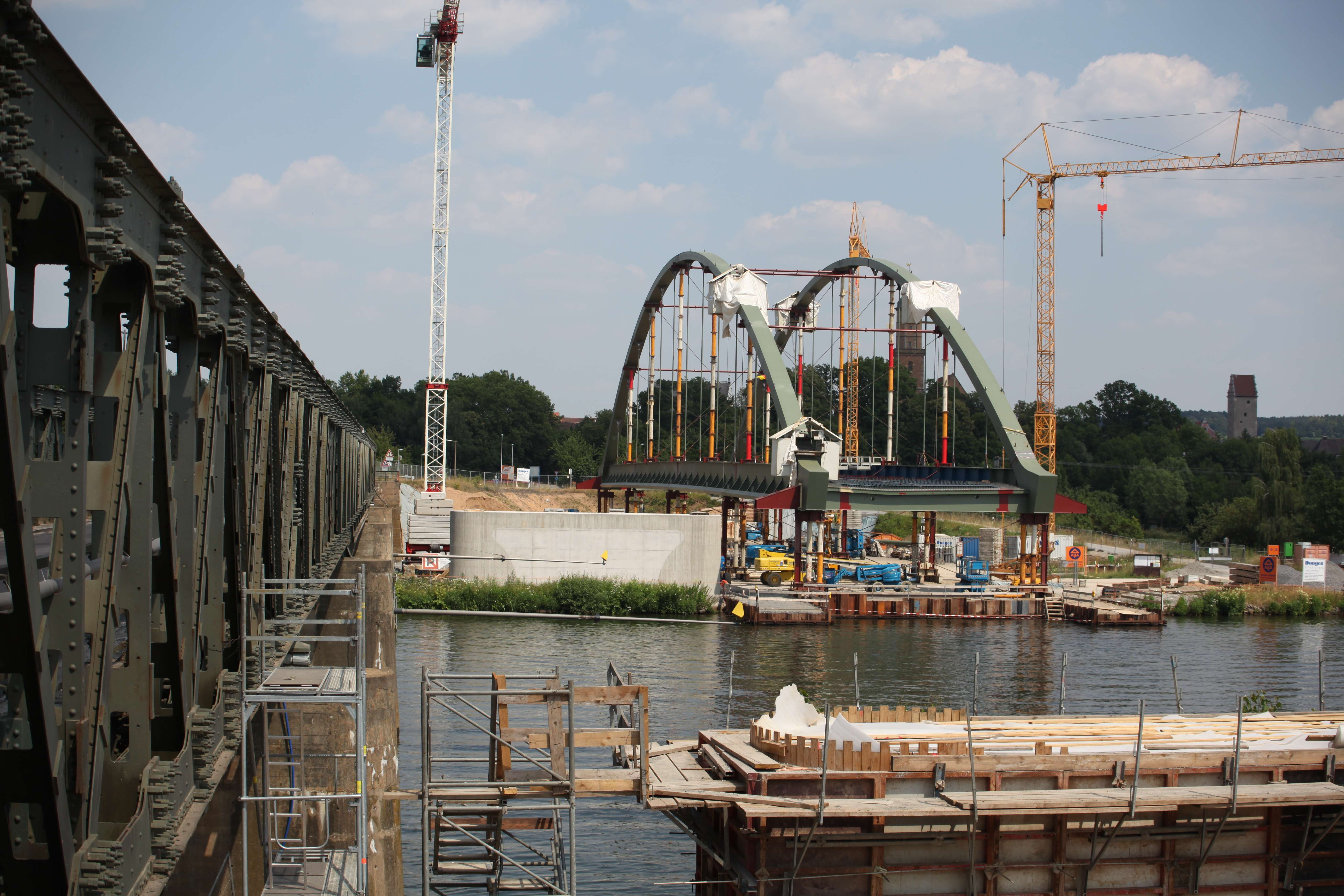 Mainbrücke Volkach